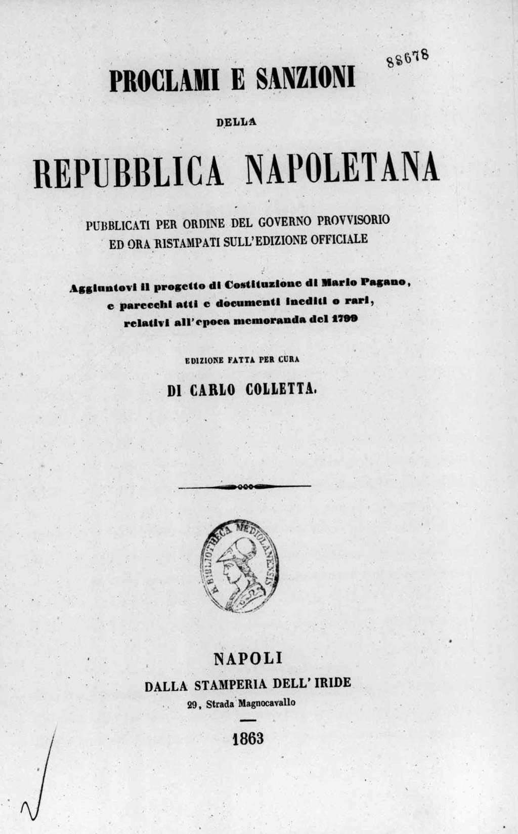 Frontespizio